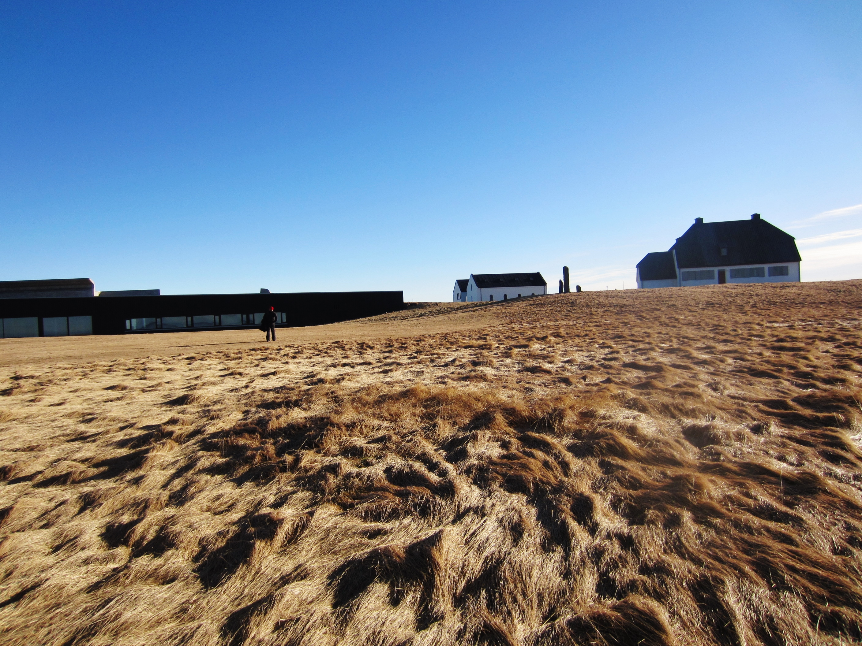 Lækningaminjasafn og Nesstofa efst á bæjarhólnum, horft til austurs